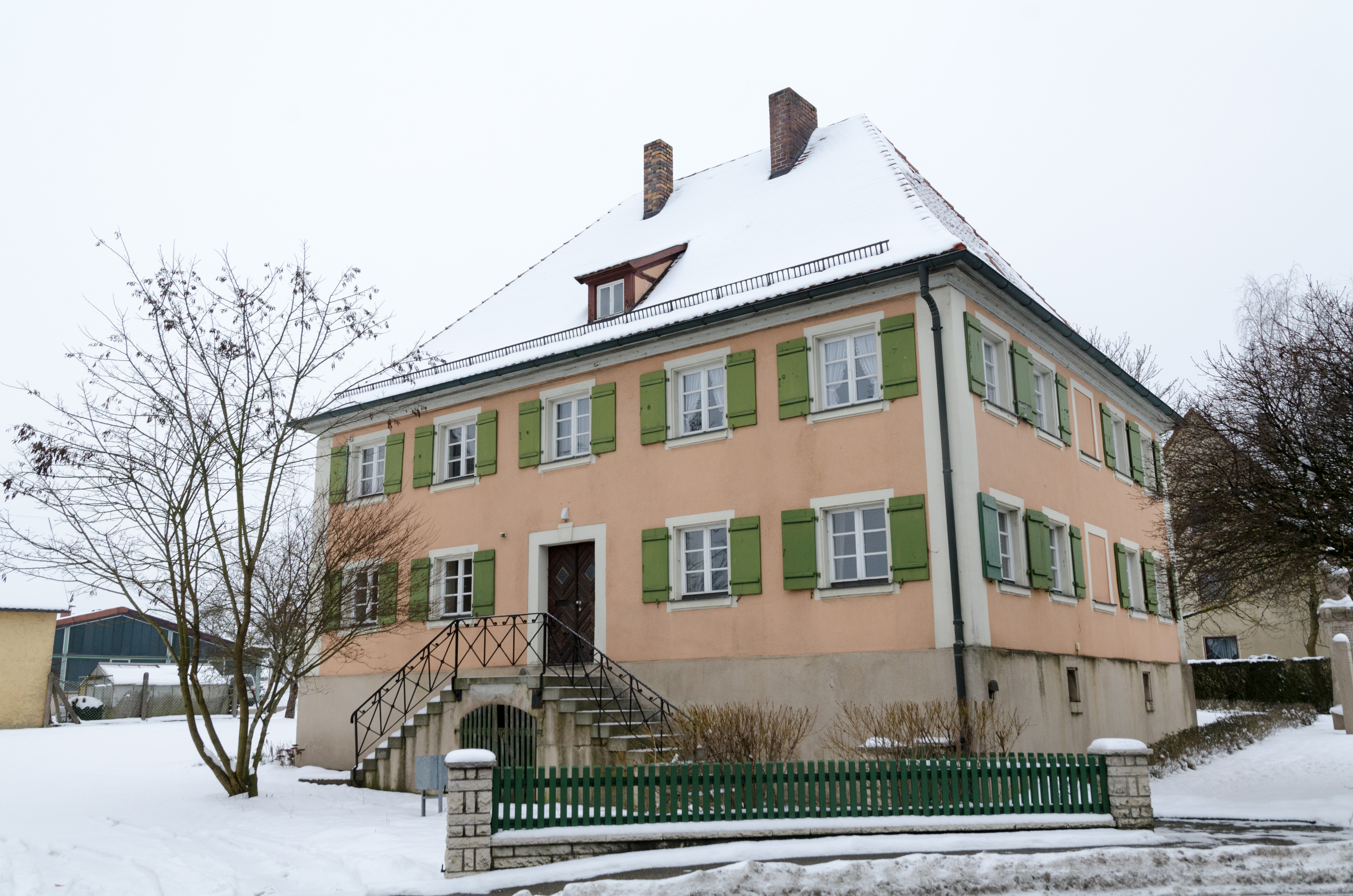 Feuchtwangen, Dorfgütingen 26